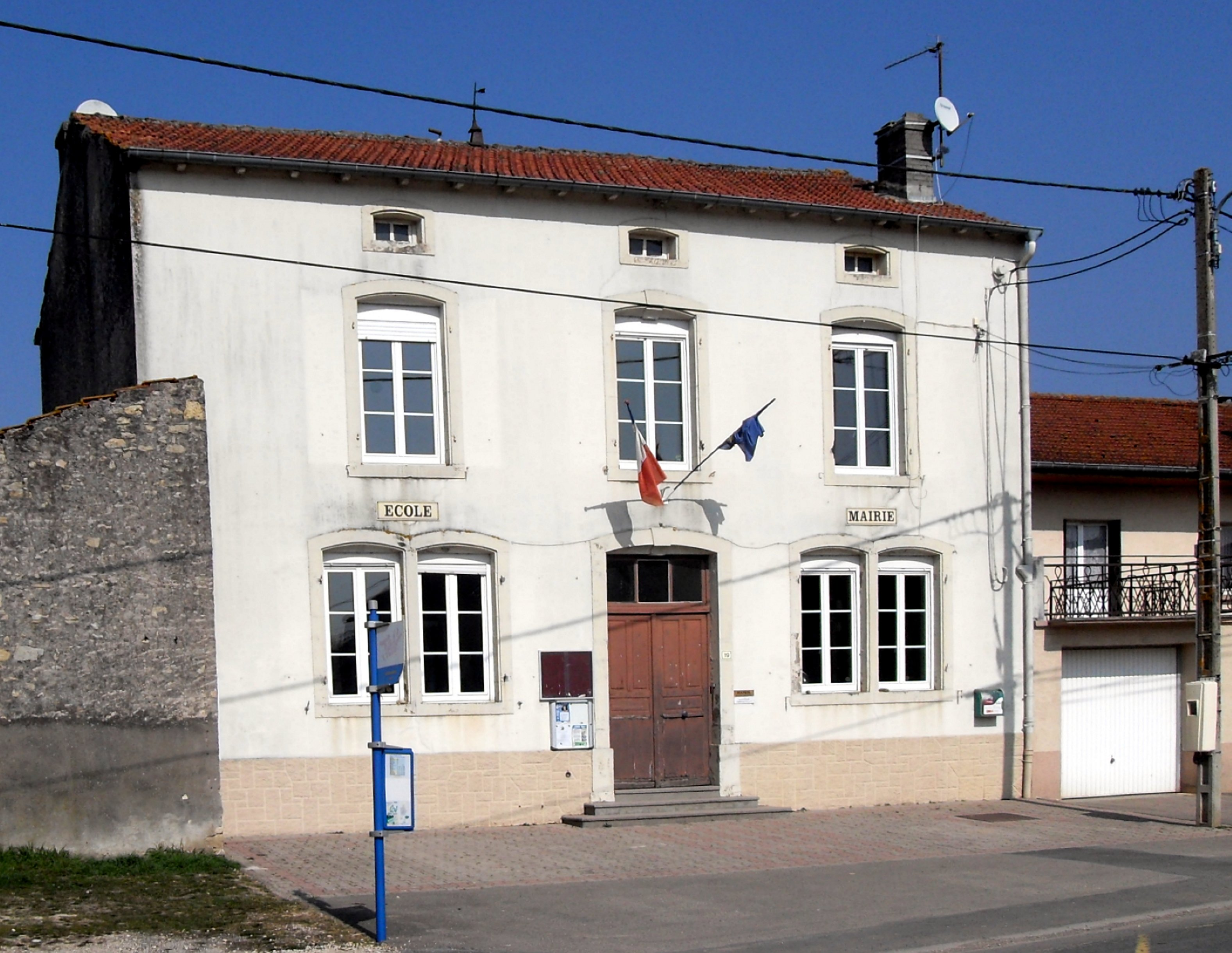 La mairie-école de Bralleville